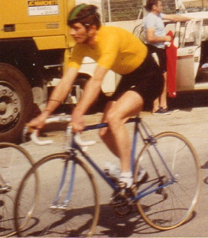 Course AS FISMAR